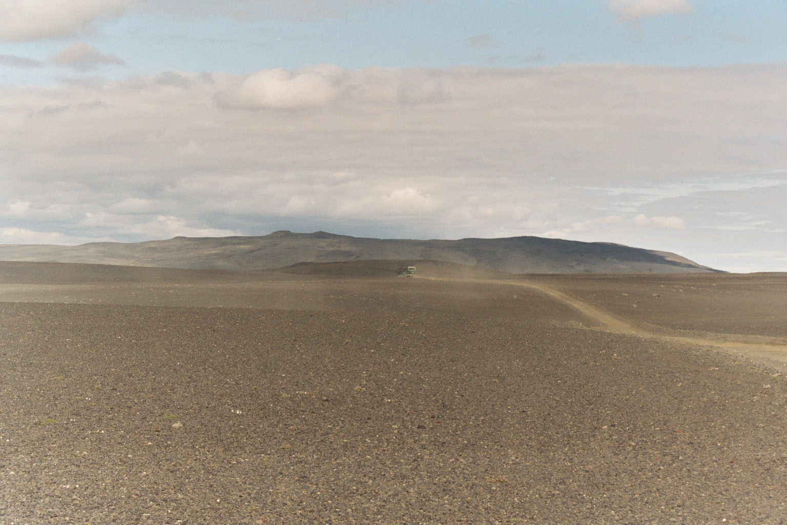 Le Sprengisandur, piste dans les hautes terres d'Islande. La photographie a été prise en juillet 2004 par Johann Dréo (nojhan). Taille de l'image : 1536 x 1024, photographie numérisée à partir d'une pellicule argentique. Catégorie:Image d'Islande